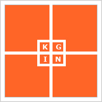 de vorm en indeling van het speelveld van King, of Kingen.